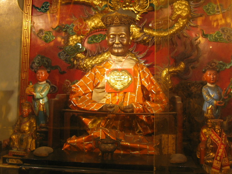 這是一張定光佛雕像的照片，由mingwangx於2006年1月13日，攝於台灣台北縣淡水鎮鄞山寺。定光佛雕像的特色是，祂的骨架有關節，可以活動。